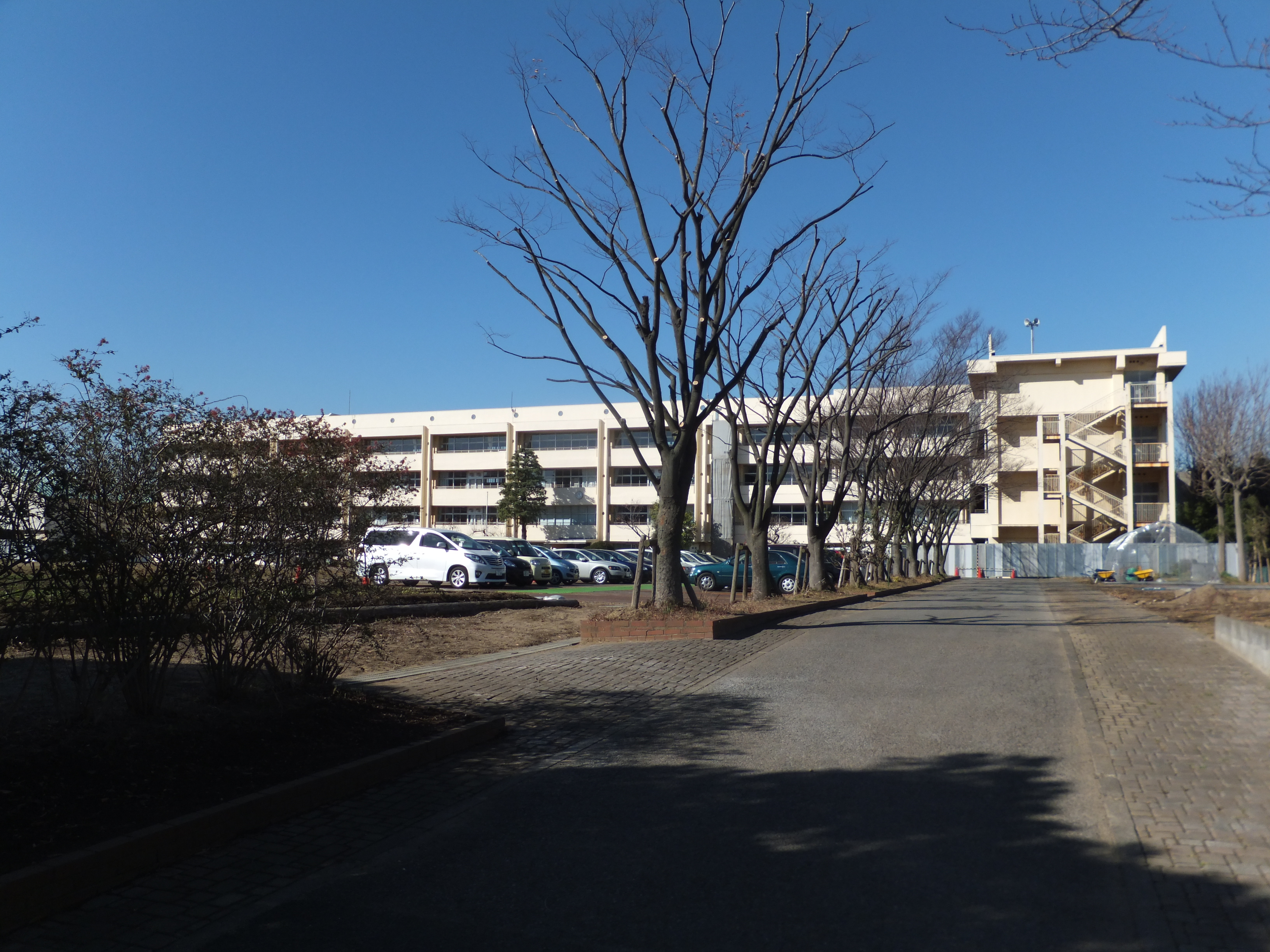 千葉市立高等特別支援学校、千葉市立養護学校真砂分校。2013年4月に、旧真砂第二小学校の校舎を再利用して開校した。養護学校真砂分校の方は2014年度までの期間限定開校である。